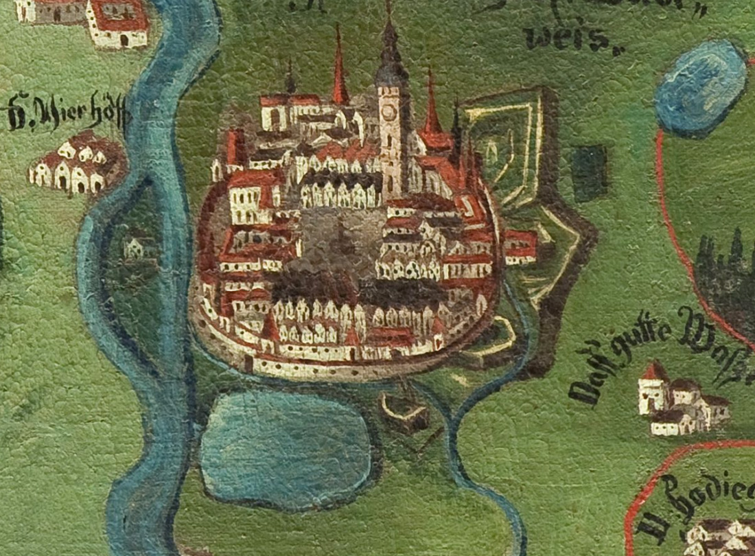 Krumlovský rybník u Českých Budějovic a výřezu mapy schwarzenberských panství